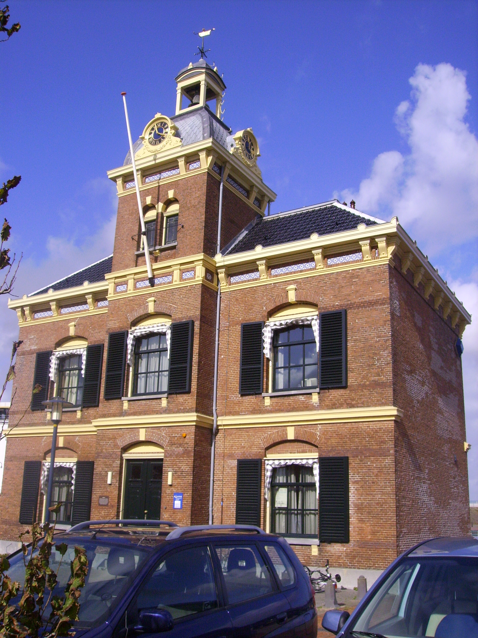 Harlingen - Ehemaliges Amtsgericht (Hafenmännchen)